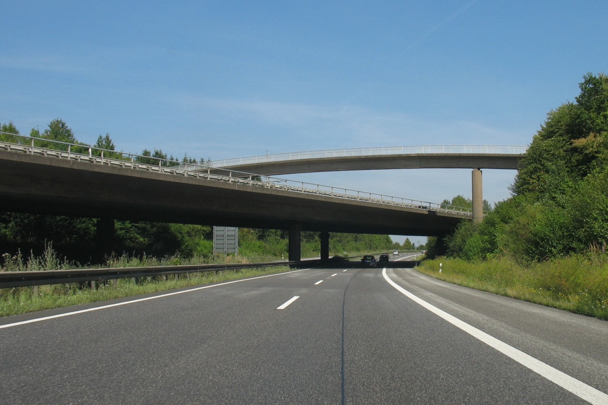 Bundesstraße 3 unterquert die A 480 beim Gießener Nordkreuz.